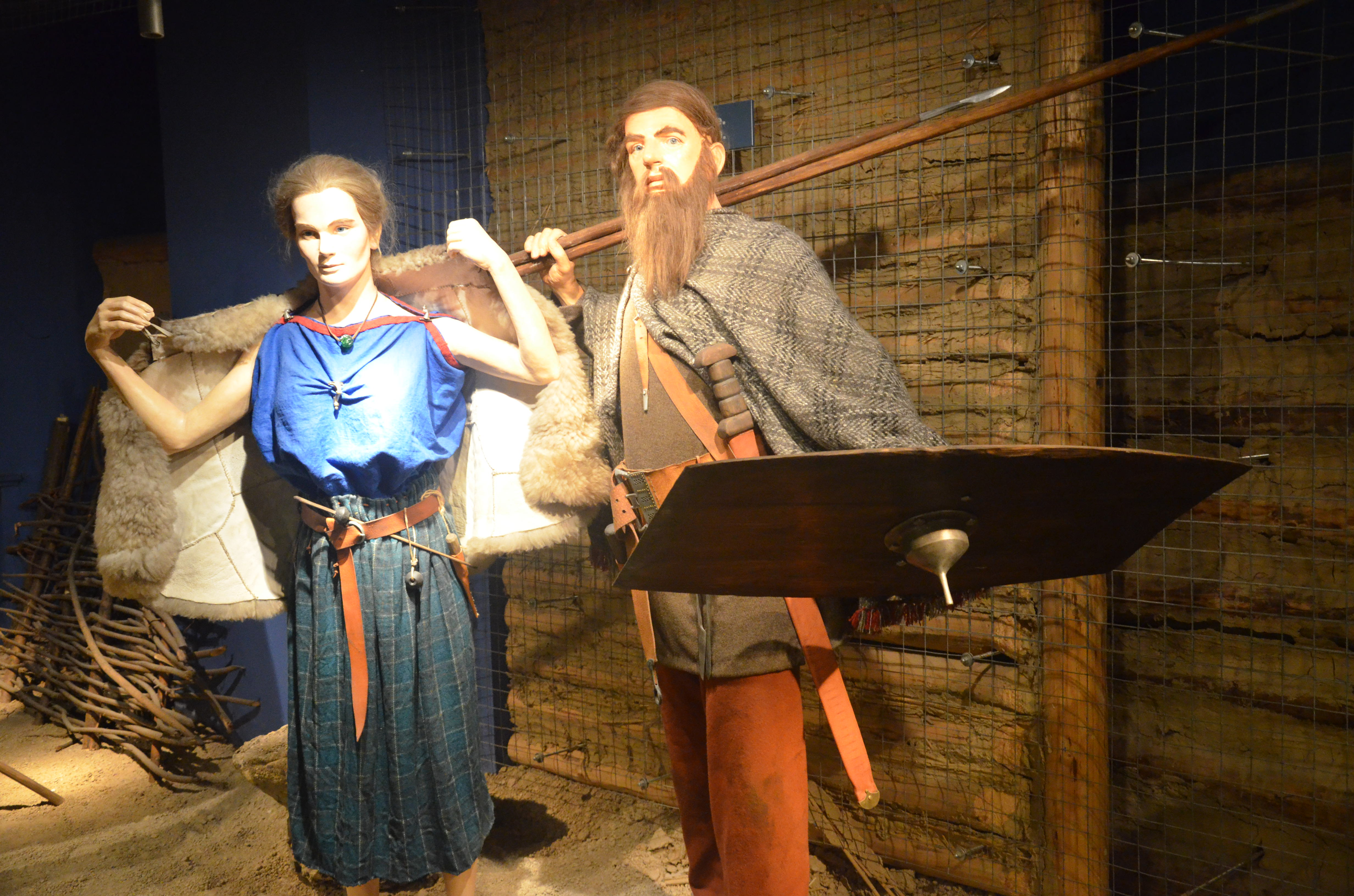 Tracht der Wandalische Krieger in Südpolen im 2. Jh. n. Chr